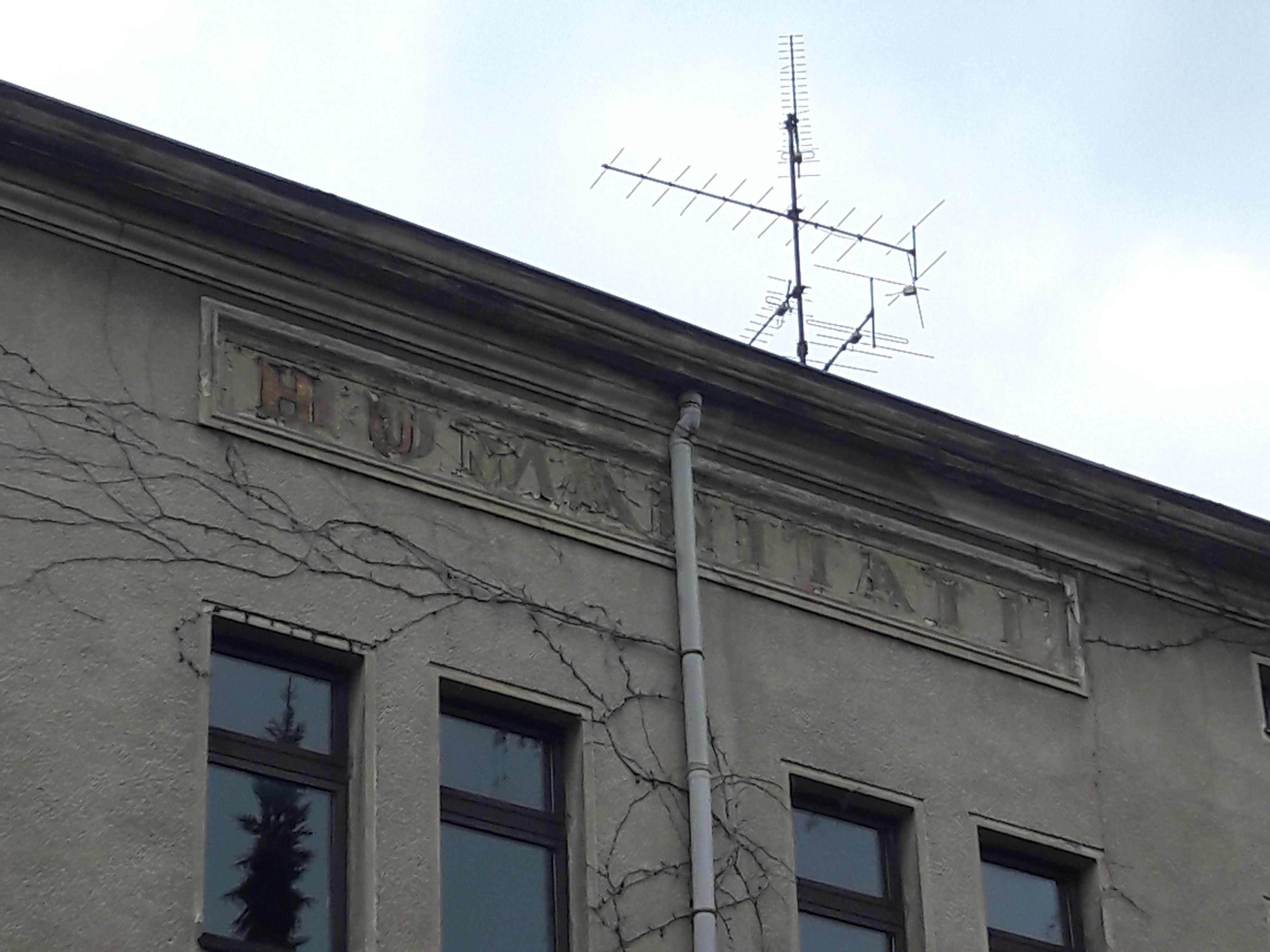 Ahornstraße 15A, ehem. Logenhaus